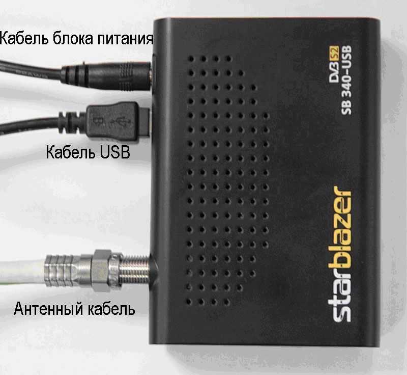 USB-приемник DVB-S/S2